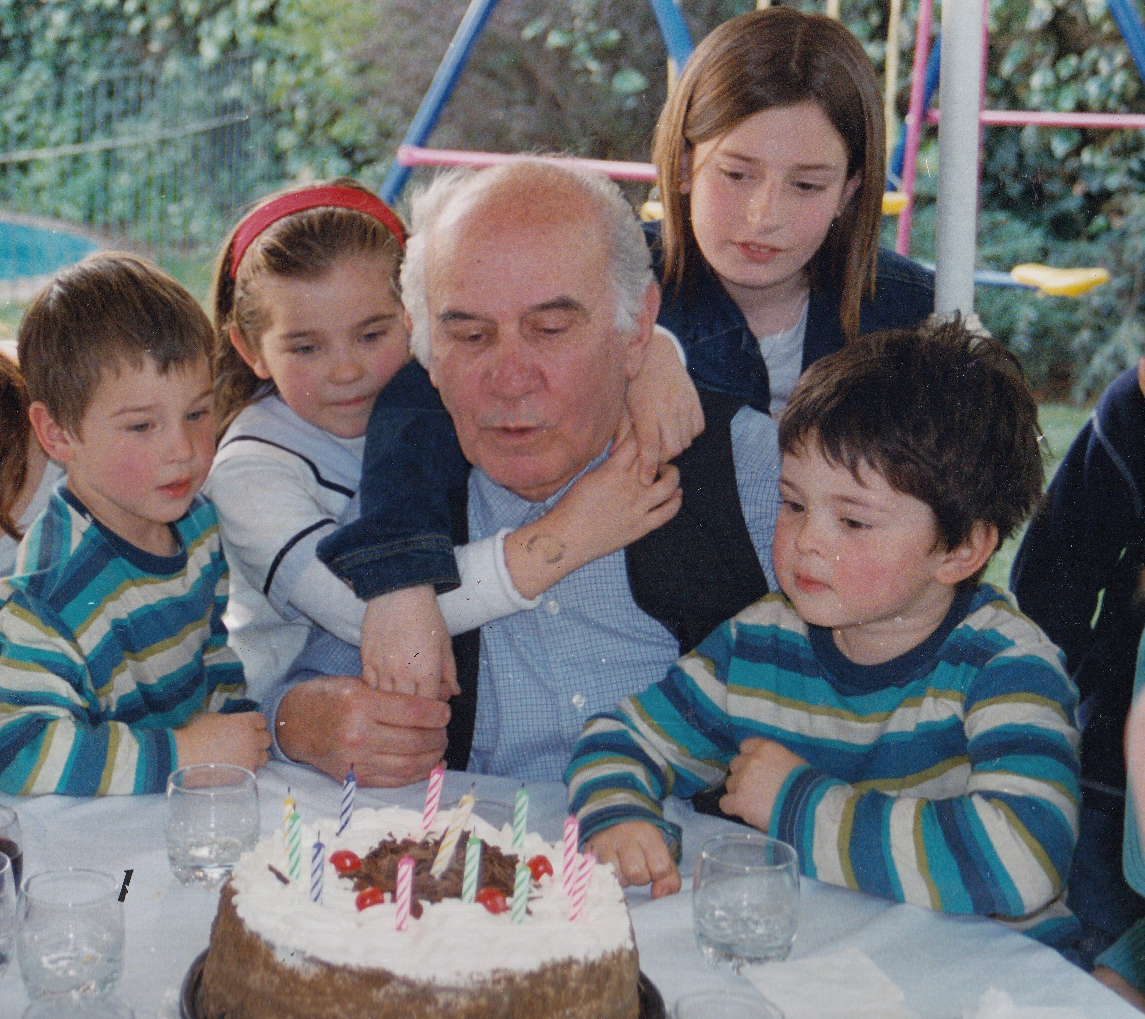 Eugenio Cruz Vargas aparece en la imagen rodeado de algunos de sus nietos en el día de su cumpleaños. A esa fecha ya había realizado tres exposiciones y publicado dos libros de poemas. Autor de la fotografía: José Cruz, quien en calidad de autor y propietario titular de la misma otorgó el consentimiento para publicar y difundir en la red internet esta imagen bajo las condiciones que establece la Licencia de Uso CreativeCommons, Atribución-Compartigual 3.0 Unported (CC BY-SA 3.0).